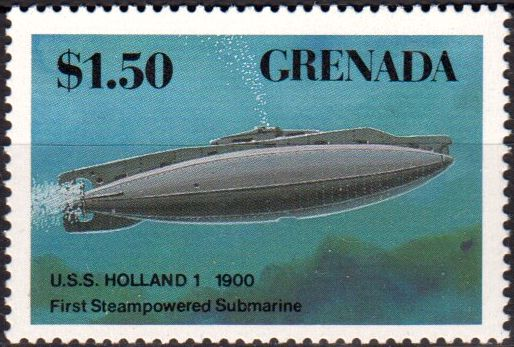 изображение почтовой марки Гренада 1987г 1601 (Michel) USS Holland I